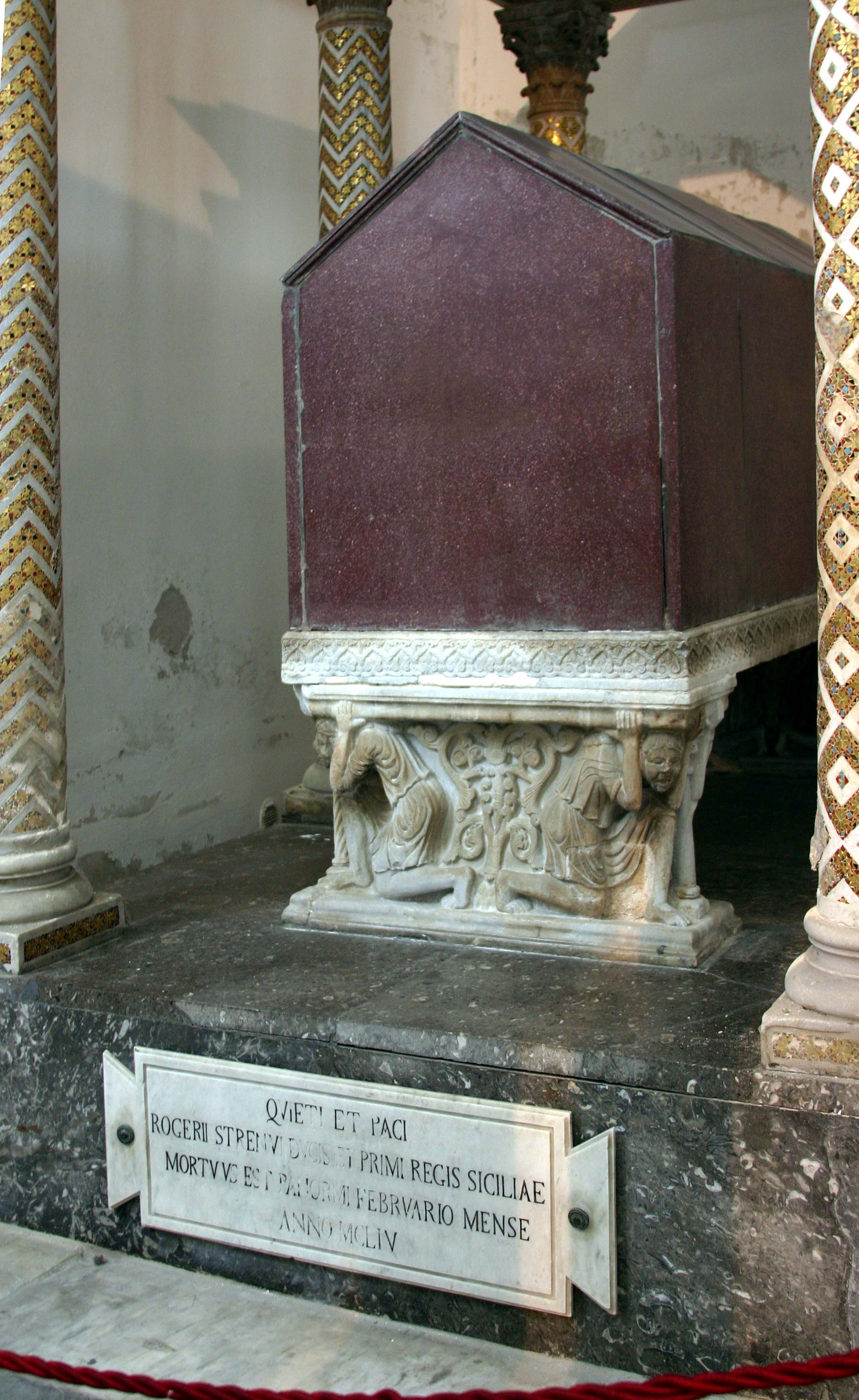 Cathedral of Palermo